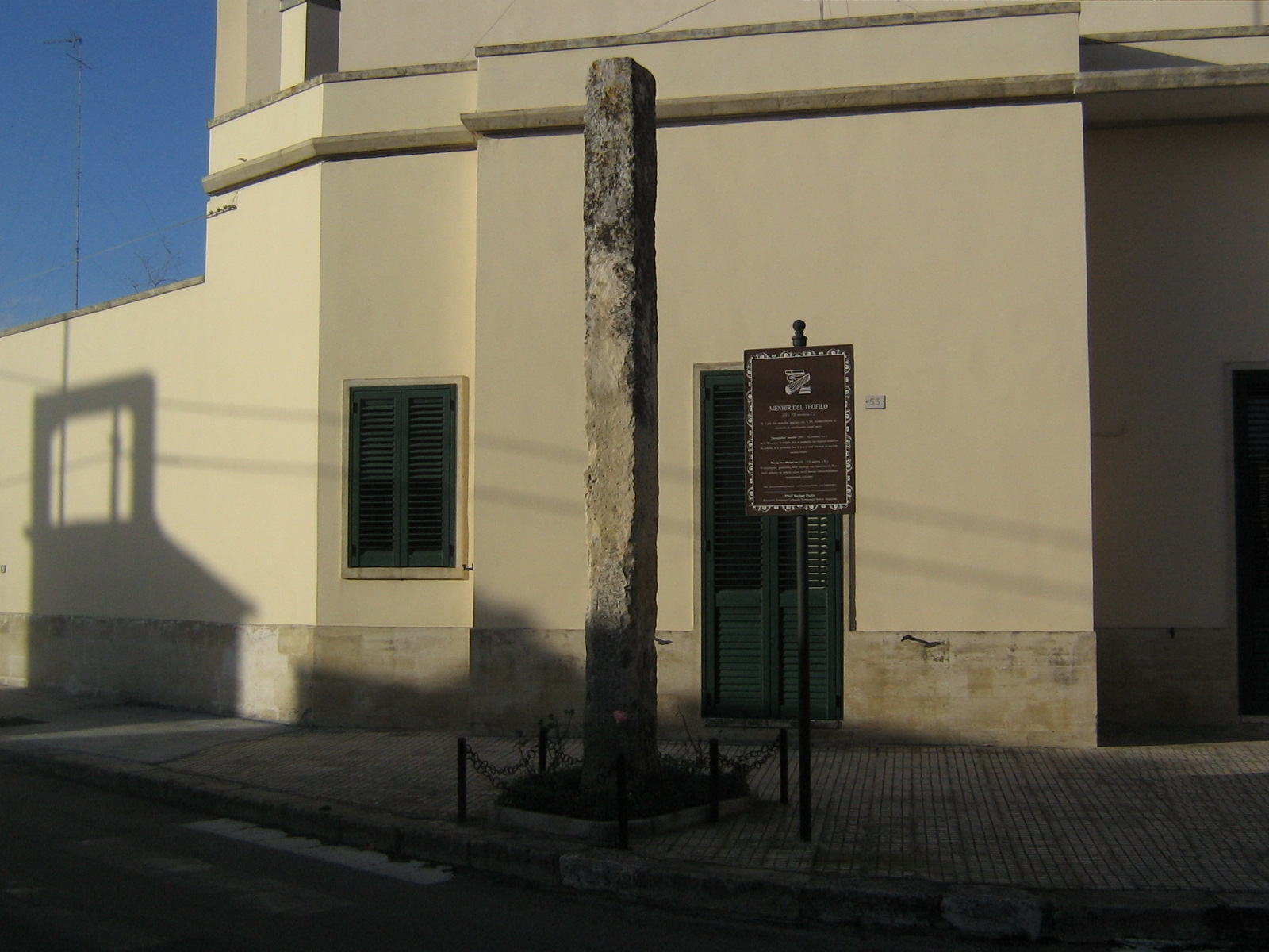 Menhir del Teofilo Martano, provincia di Lecce